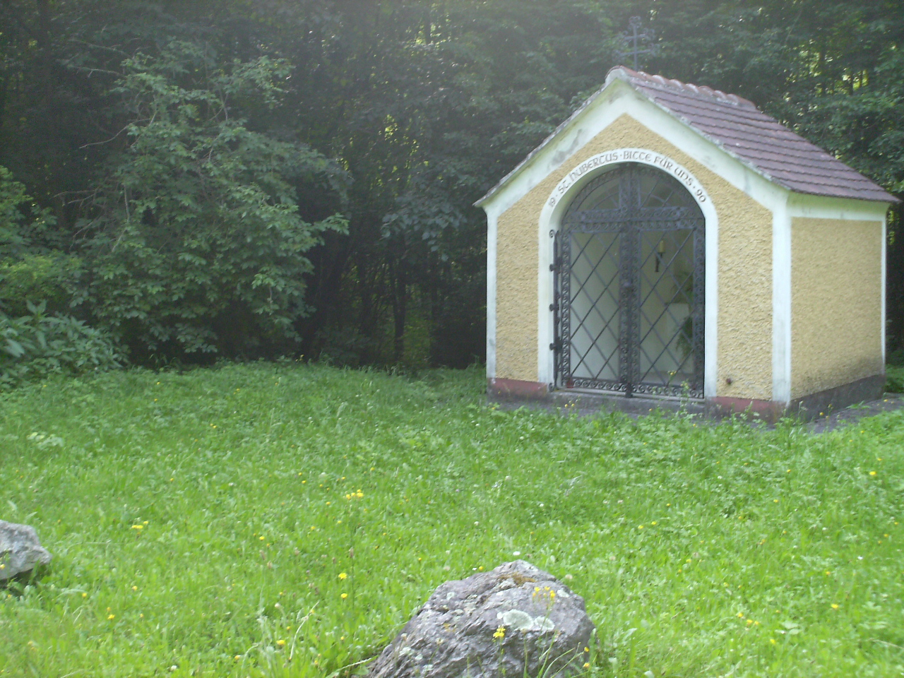 Blashauskapelle bei Aggsbach/Dorf/NÖ. Darunter Fundstelle römischer Burgus.